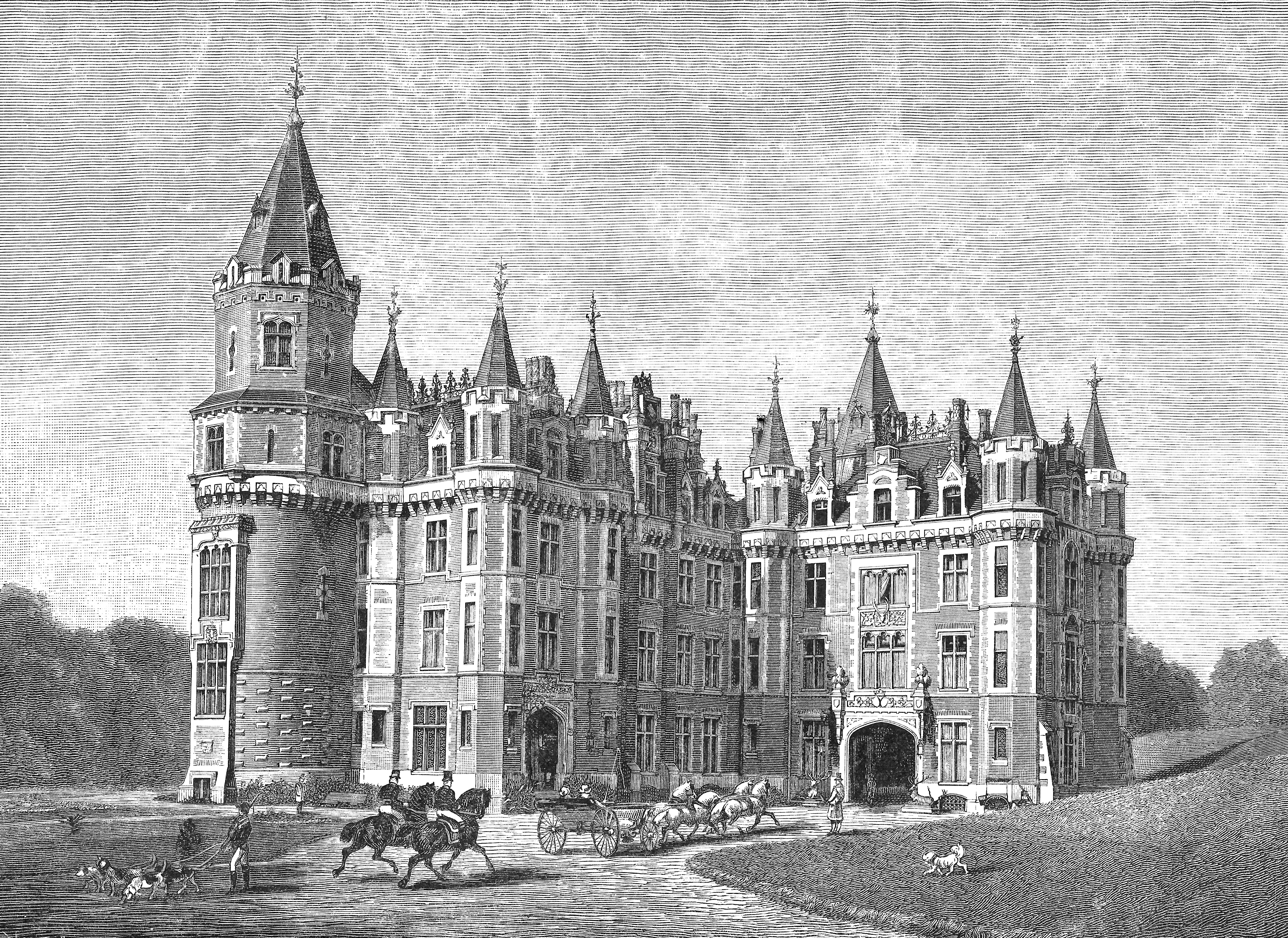 Château des Amerois, résidence du comte de Flandre. — Le Château des Amerois, situé près de Bouillon, était la résidence d’été du prince Philippe de Belgique, comte de Flandre, qui y passait régulièrement plusieurs mois chaque année. Il fût complètement reconstruit après avoir été incendié en 1873.